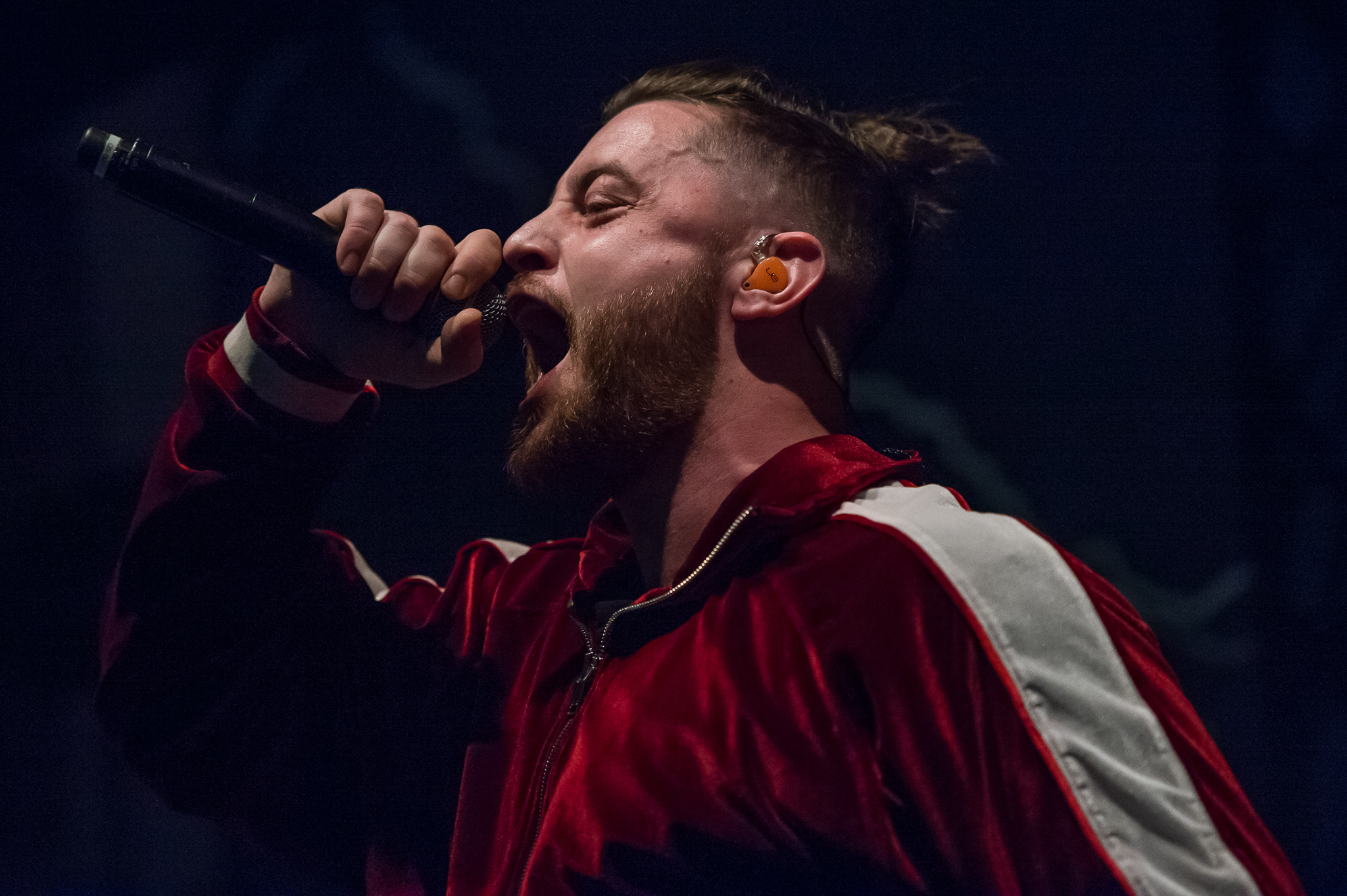 Bausa,Concertbüro Franken,Julian Otto,Konzert,Livekonzert,Livemusik,Löwensaal,Musik